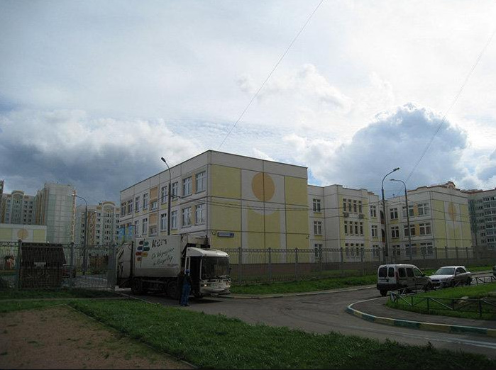 Детский сад, Захарьинские Дворики